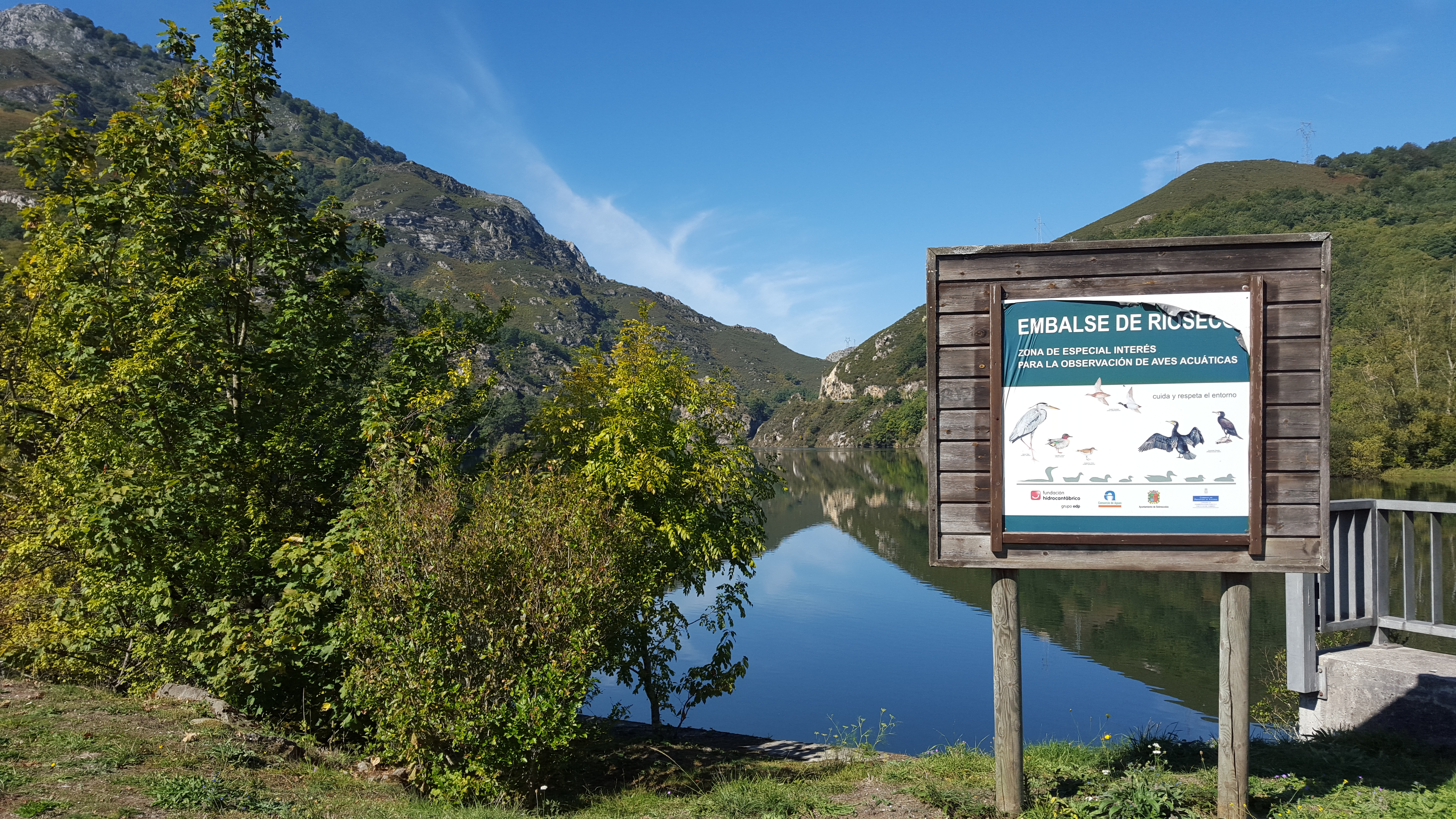 Rioseco, Premio Príncipe de Asturias Puebo Ejemplar 2009